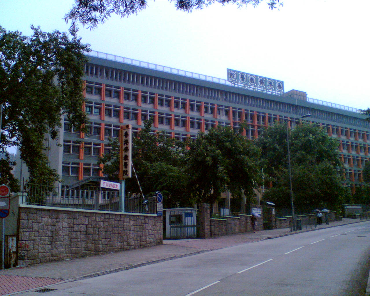 香港佛教醫院